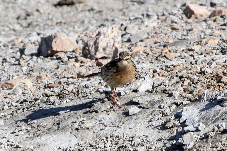 Taibai Shan, Shaanxi